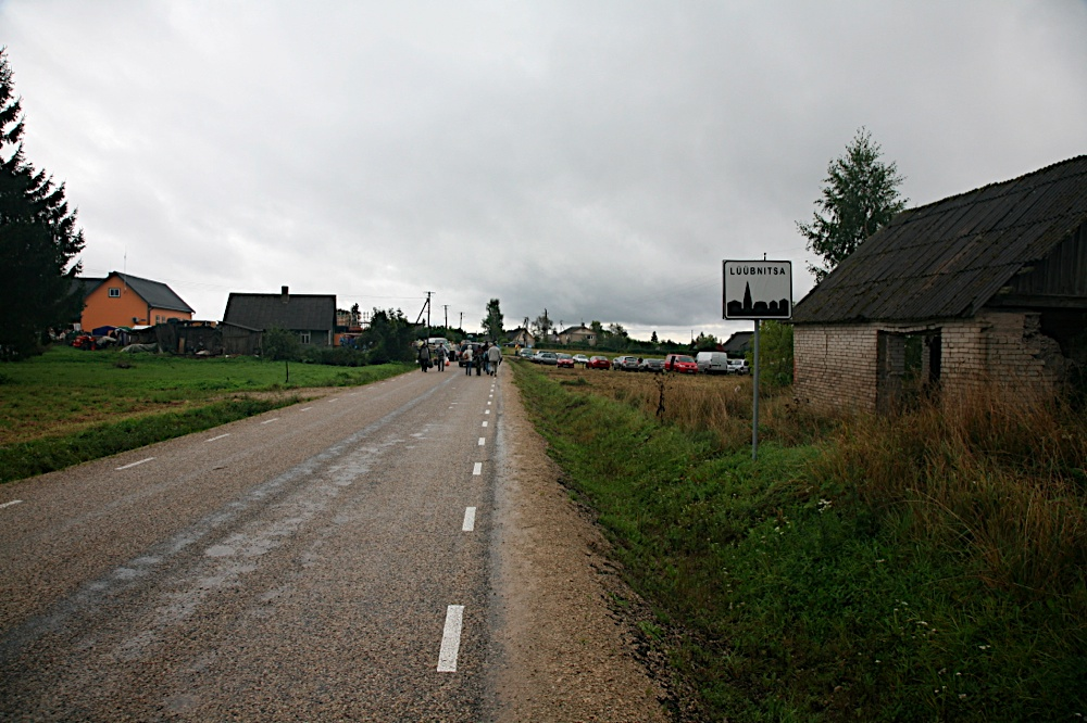 Lüübnitsa